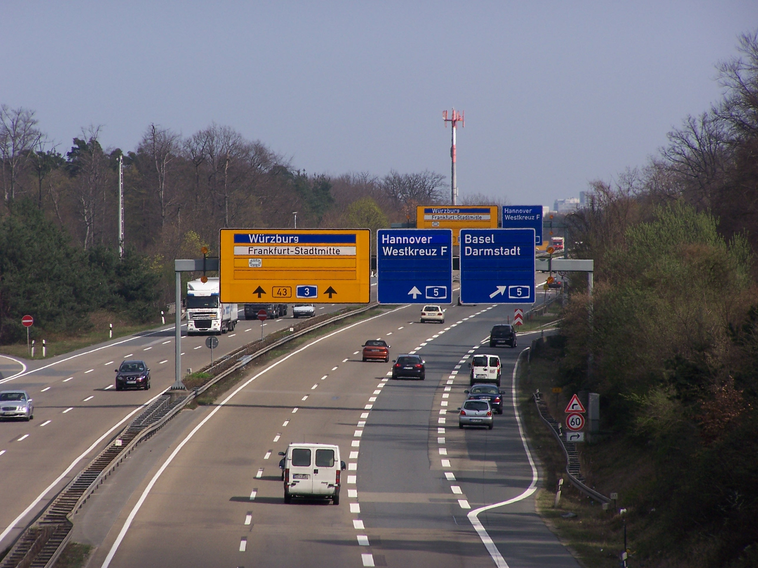 Blick von der Brücke Ellis Road auf die Bundesstraße 43 Richtung Frankfurter Kreuz